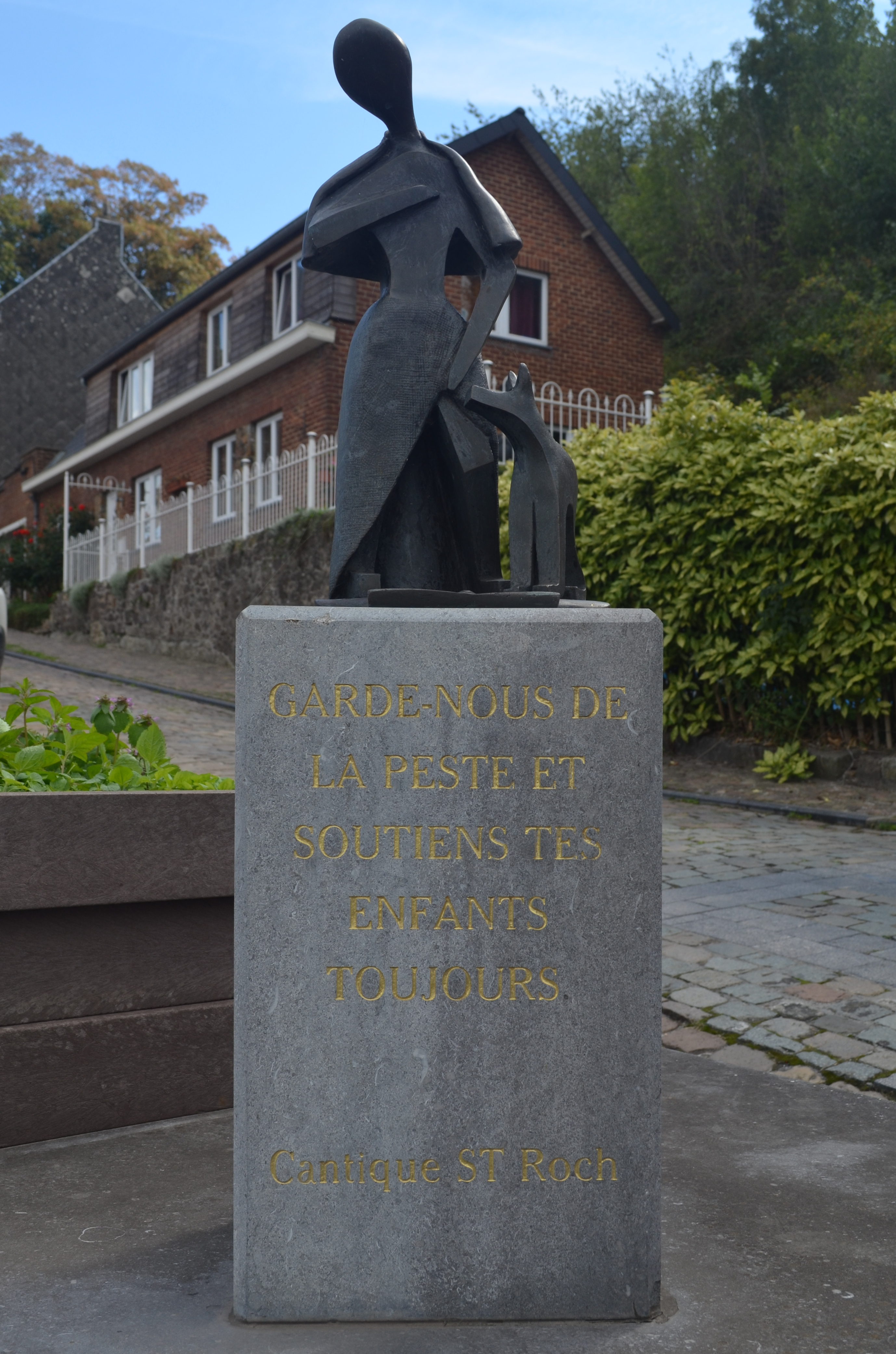 Thuin (Belgique) - En 2002, cette statue de bronze, œuvre de Toma de Thuin, a été bénite par Ignace Leman, doyen, et inaugurée avec faste en présence des sociétés folkloriques thudiniennes et des autorités locales. En décembre 2013, le Comité Saint-Roch a pris l'initiative de faire graver dans la pierre un témoignage de la reconnaissance mondiale du phénomène des Marches de l'Entre-Sambre-et-Meuse. C'est ainsi quele socle,en pierre bleue, de l'œuvre d'art a reçu l'inscription : « Marche Saint-Roch de Thuin reconnue, le 5/12/12, « Patrimoine culturel et immatériel de l'Humanité » par l'UNESCO » (texte de la pancarte placée à côté de la statue).